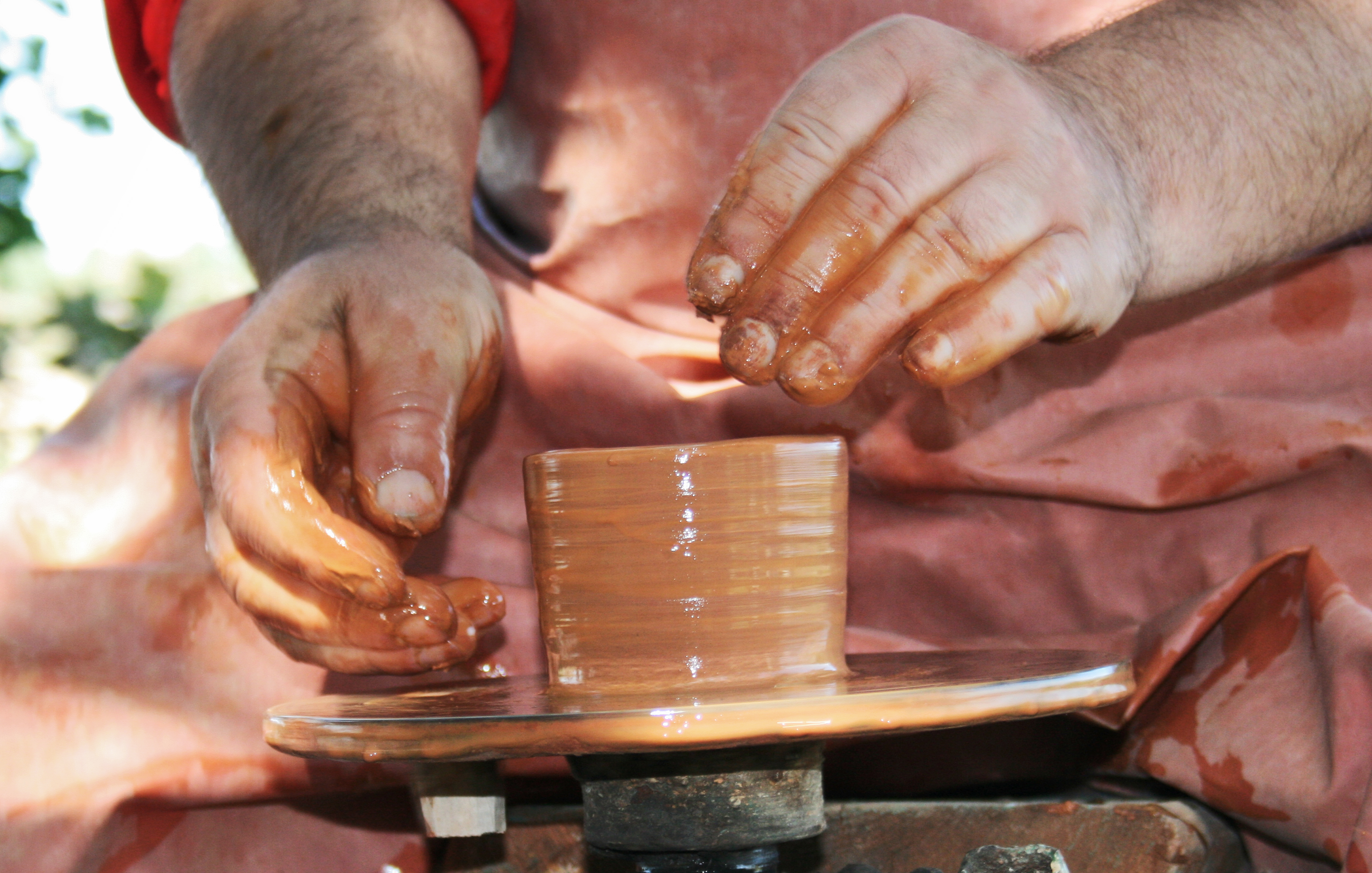 Гончар Калашников Виталий Никитич в гостях у родового экопоселения «Кореньские родники». Белгородская область.